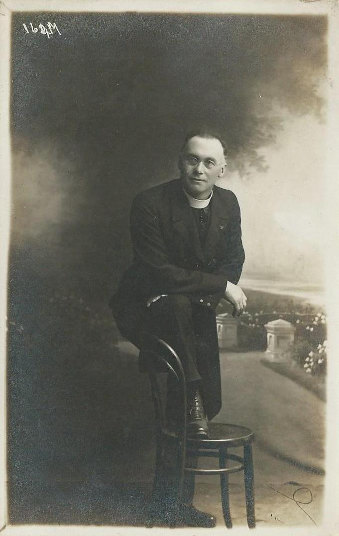 Bildo de Patrick Parker (Irlando), 1911